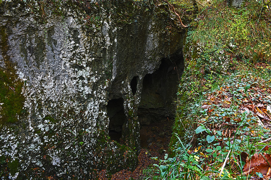 Krajinski park Beka, Miškotova jama